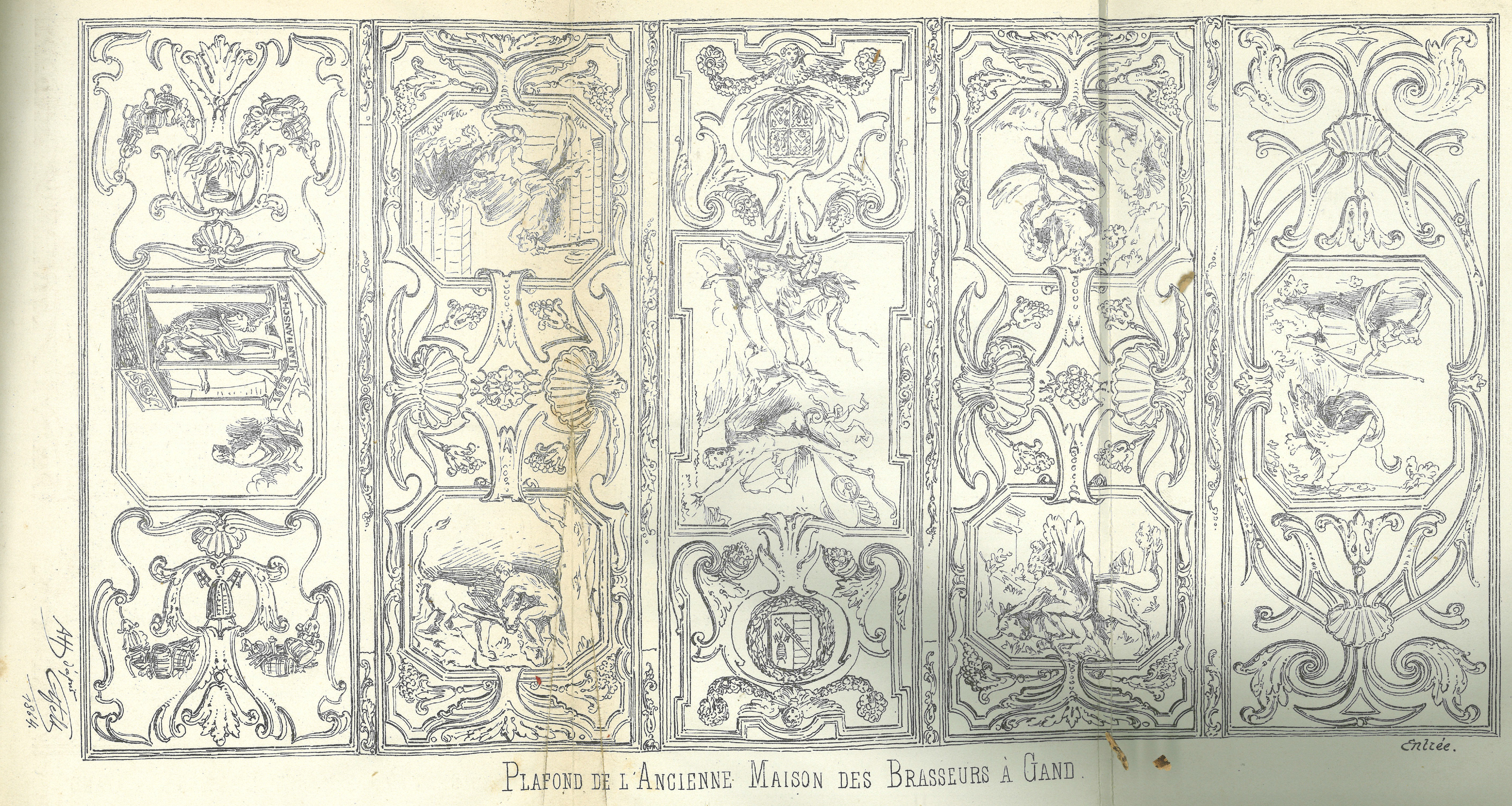 Plafonddecoratie in stucwerk in de grote zaal van het voormalige ambachtshuis van de brouwers, Onderbergen 36-38 (hoek Zwartezustersstraat, vroeger Wagenaerstraat, tegenover de nu verdwenen Dominicanenkerk), Gent. Werk van beeldhouwer Jan Hansche, 1673. Het plafond is opgebouwd uit vijf delen en toont mythologische taferelen en wapenschilden. Van links naar rechts (ingang van de zaal): 1) voorwerpen die verwijzen naar het brouwersambacht, een zittende allegorische figuur, de naam van de beeldhouwer Jan Hansche en het jaar 1673; 2) uit de twaalf werken van Herakles (Hercules): het doden van de Hydra van Lerna (boven) en het doden van de leeuw van Nemea (onder); 3) de wapenschilden van het brouwersambacht en van Pierre Dellafaille, voorschepen van de keure in Gent, en centraal Phaëton die uit de zonnewagen van zijn vader Helios wordt geslingerd; 4) uit de twaalf werk van Herakles: het verslaan van de Amazones (boven) en het gevangen nemen van de Stier van Kreta, vader van de Minotaurus (onder); 5) uit de twaalf werk van Herakles: het doden van de draak Ladon. Lithografie Armand Heins, naar tekening C. Tfelt, 1864.